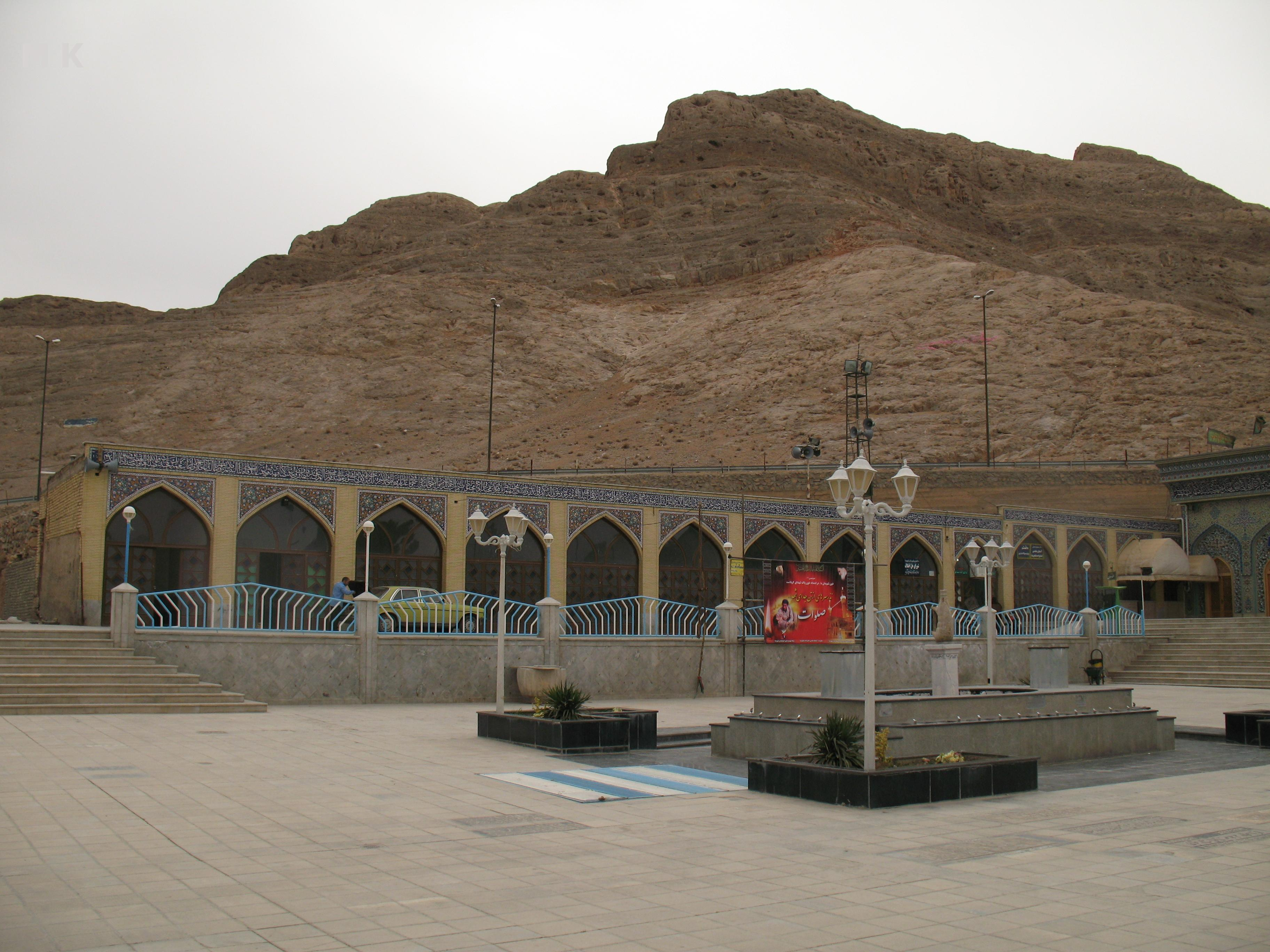 Shahreza Tomb شورای حل اختلاف